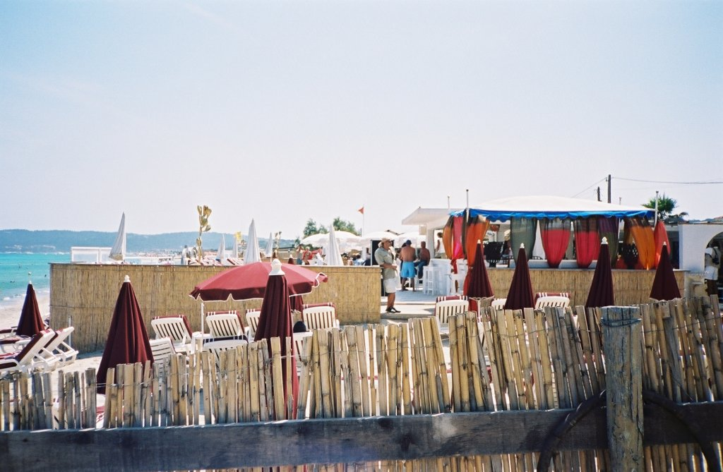 Club de plage " La Voile Rouge " sur les plages de Pampelone à Saint Tropez